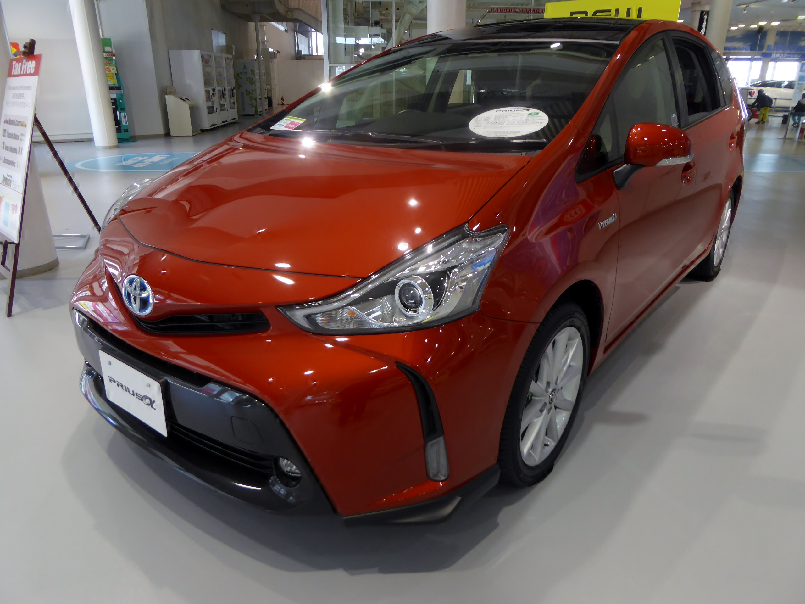 ZVW40W型トヨタ・プリウスα G"ツーリングセレクション"をフロントから撮影。